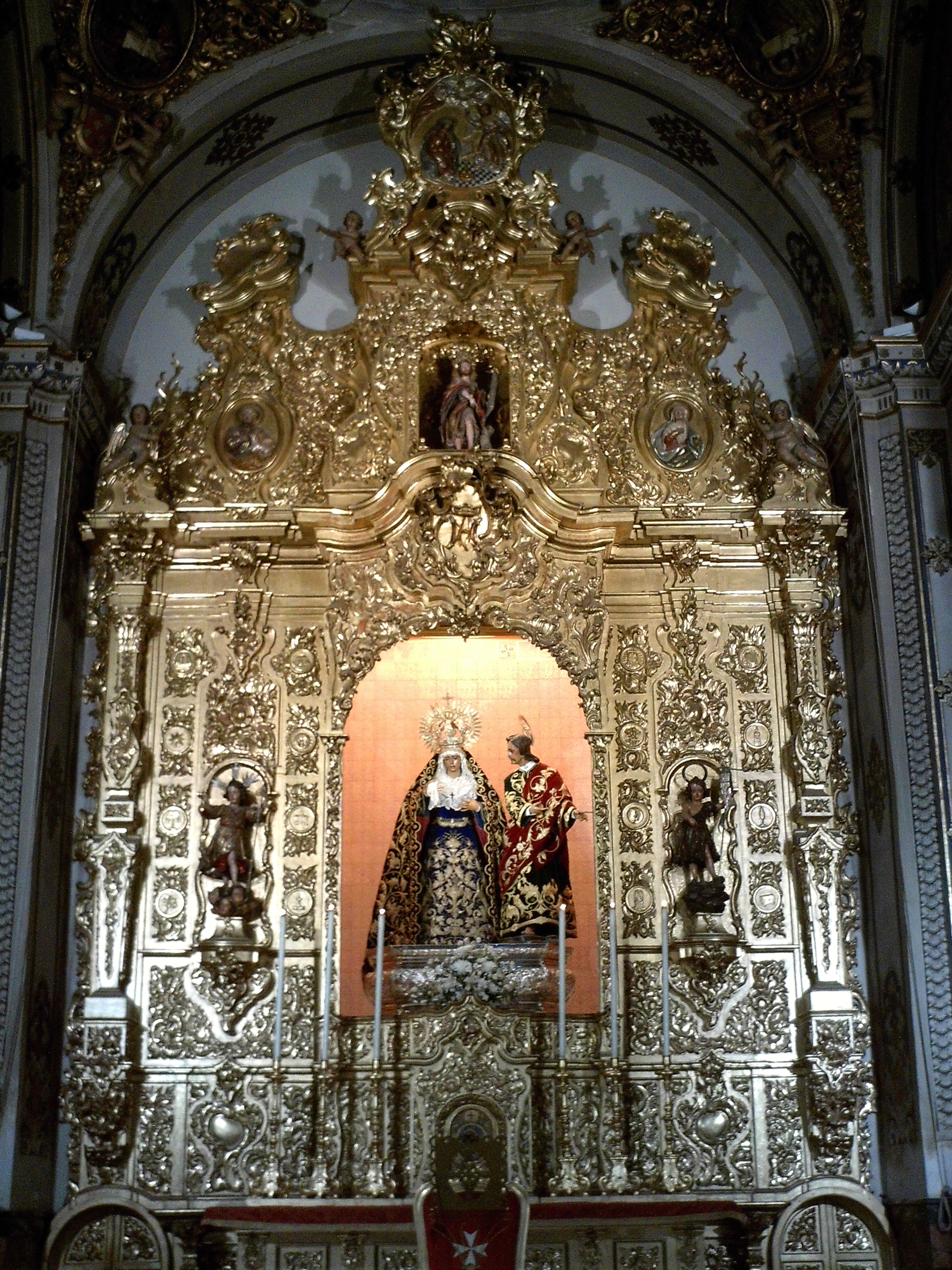 Virgen de la Amargura y San Juan Evangelista. Retablo mayor de la iglesia de San Juan de la Palma. Sevilla, Andalucía, España.